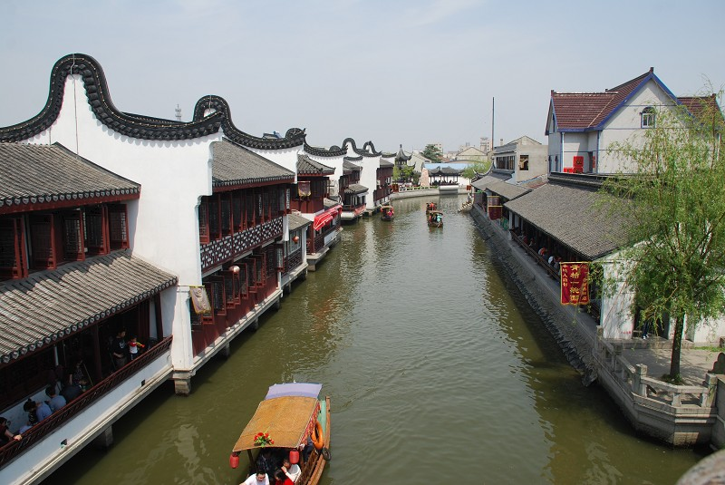 上海浦江，召稼楼古镇